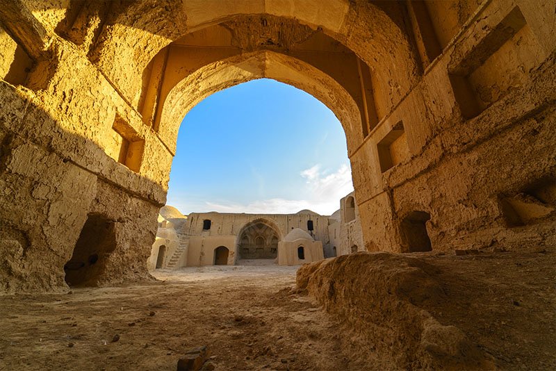 نمای داخلی قلعه مچی